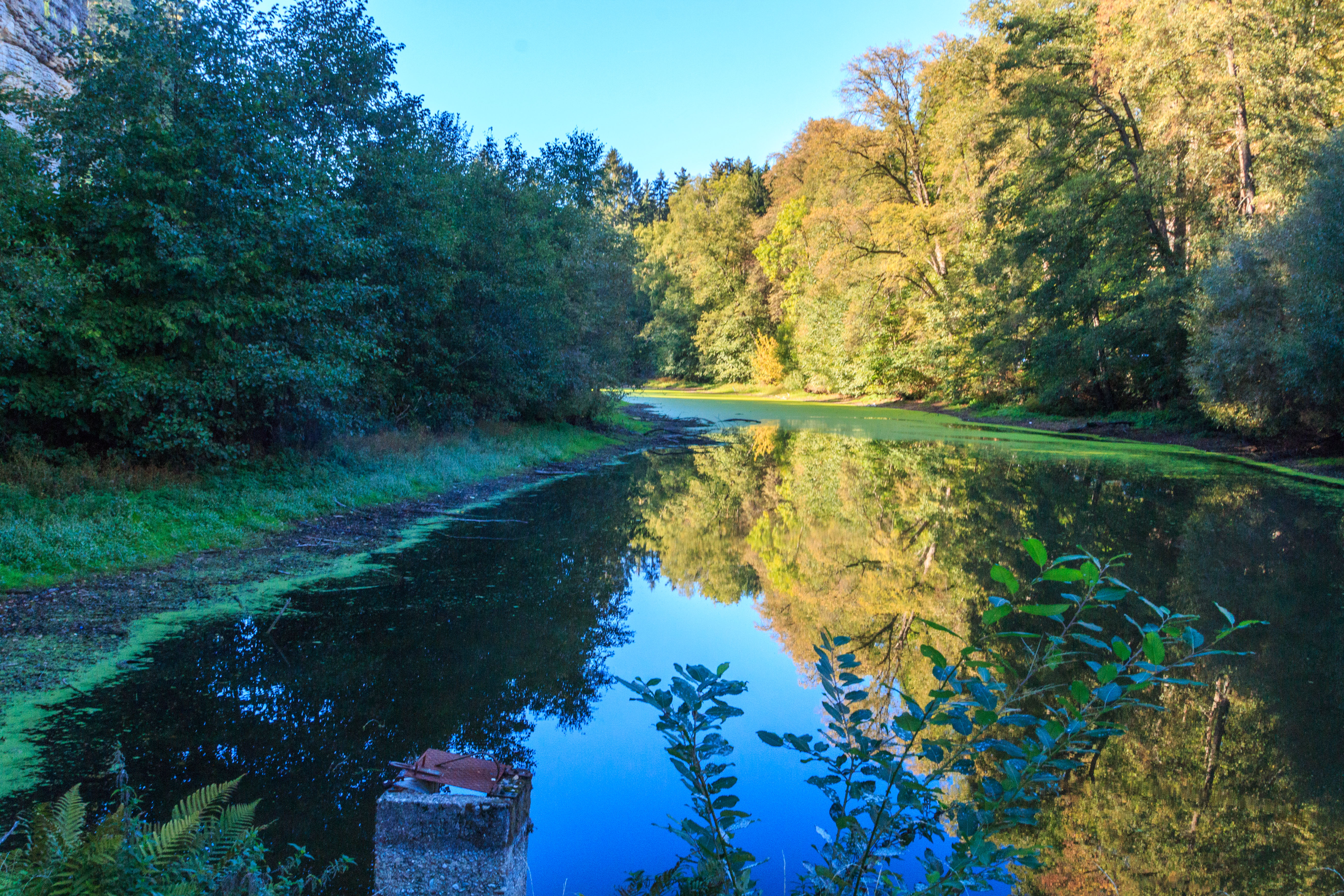 Černý rybník v údolí Plakánek Project: Vodstvo.